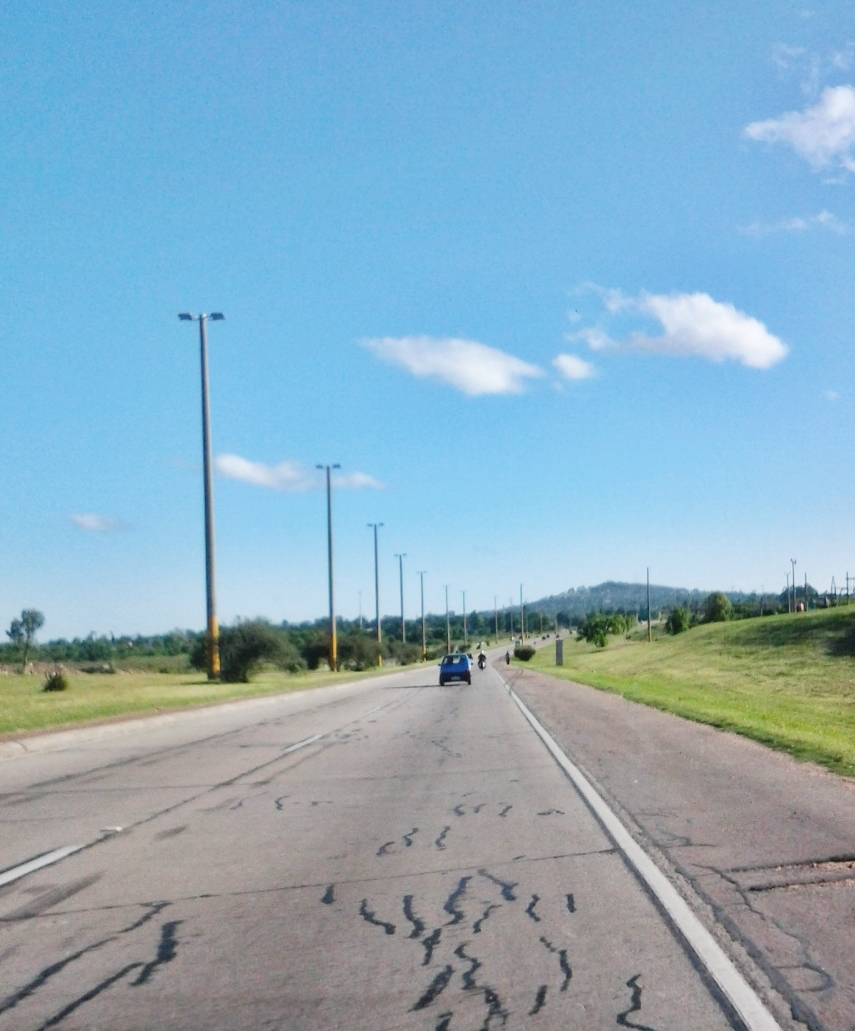 Ruta 5 hacia el centro de Montevideo, al fondo el Cerro de Montevideo